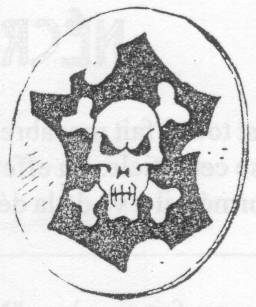 uso : periodico satirico personal usuario:AlCarlesAlDjinn